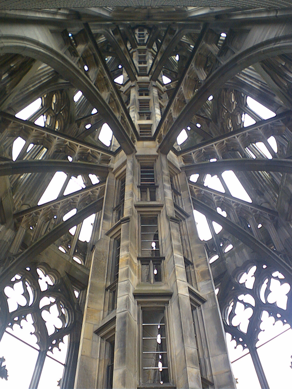 Ulmer Münster: Blick auf die Turmspitze von Innen (Treppenaufgang zur Aussichtsplattform)